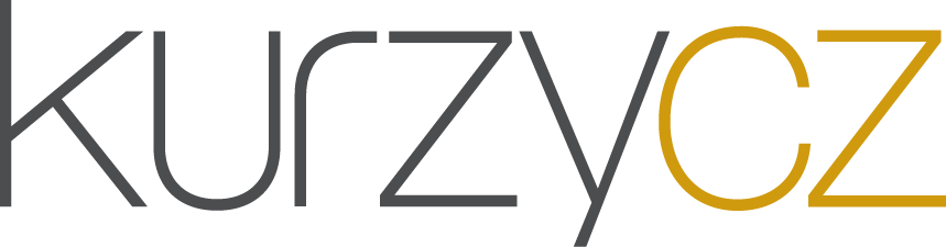 Kurzy.cz - Logo